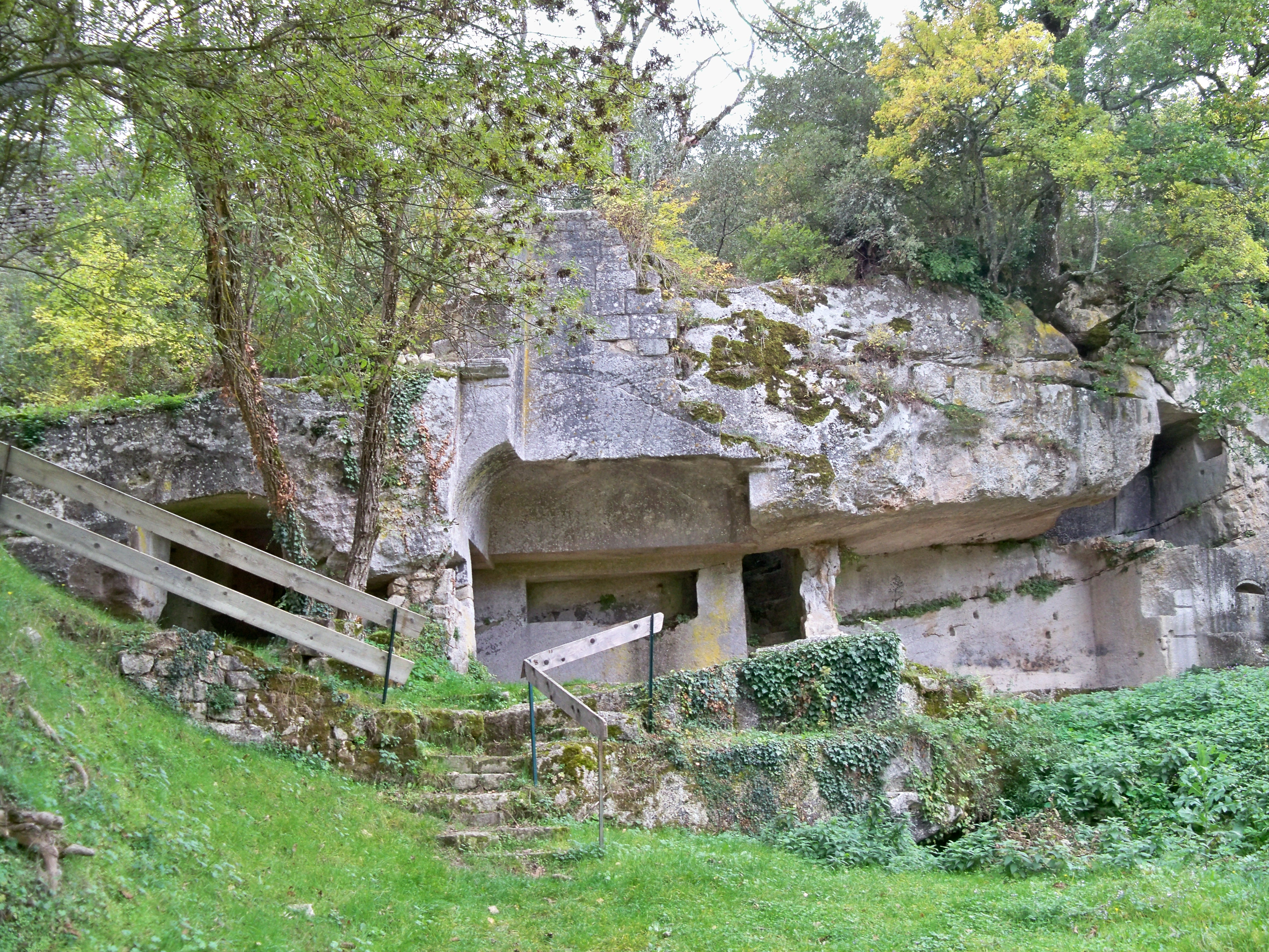 vue générale de la partie trioglodytique du Prieuré de Carluc, à Céreste, Alpes de Hatue Provence, France